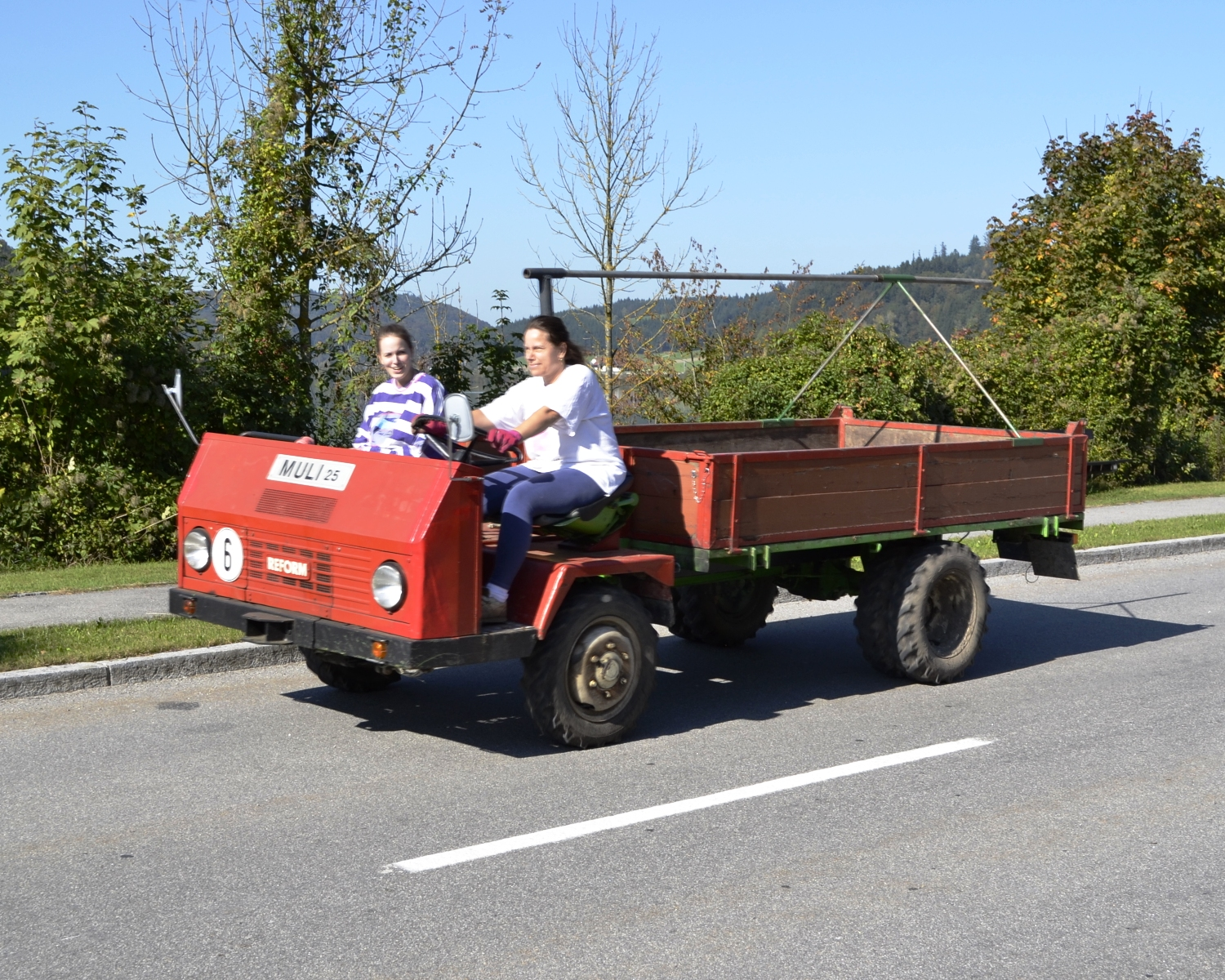 Ein Reform Muli 25 in Oberösterreich.